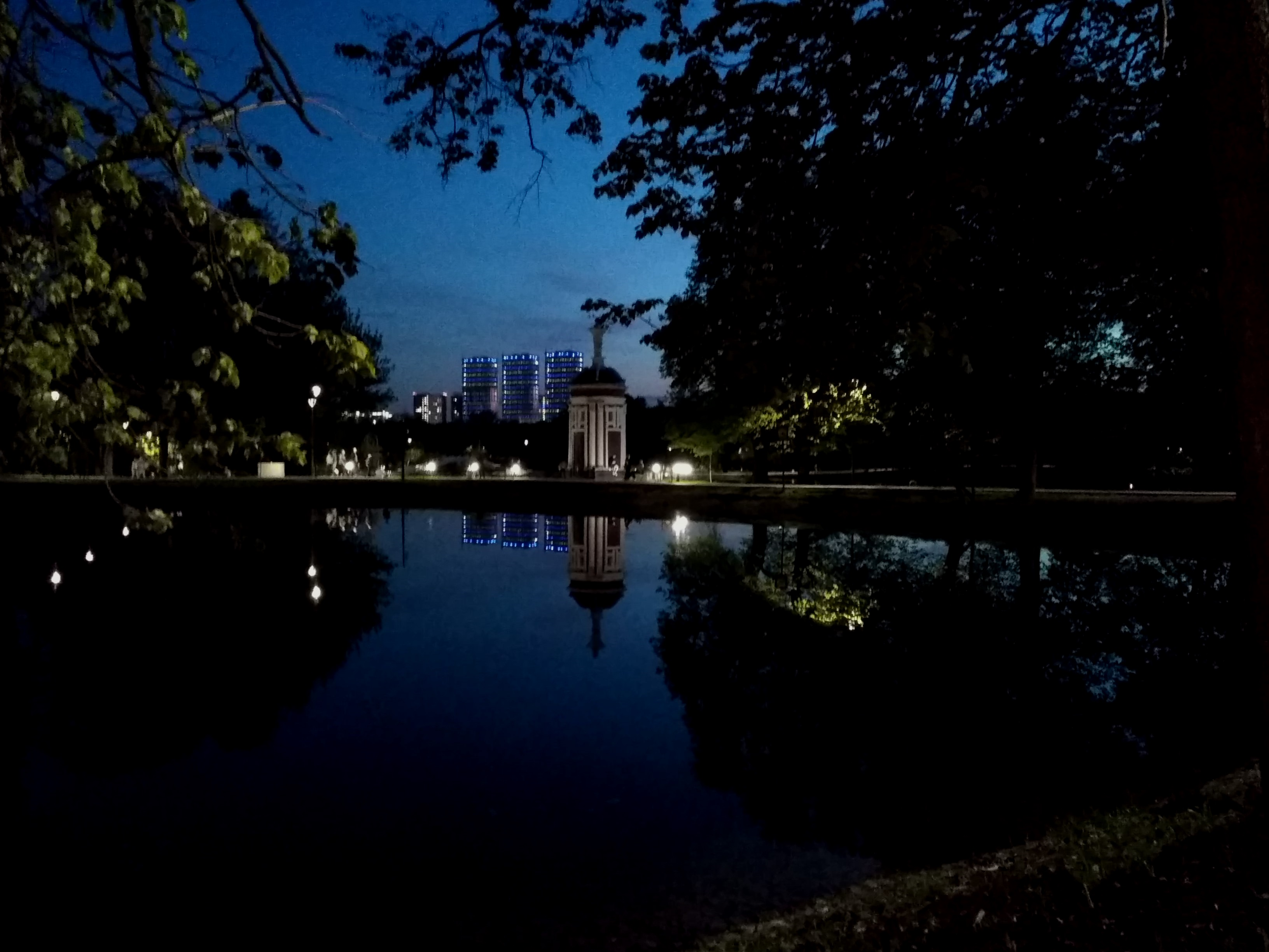 Парк у усадьбы Михалково. Вечерний вид на ротонду у Большого Головинского пруда. Май 2018